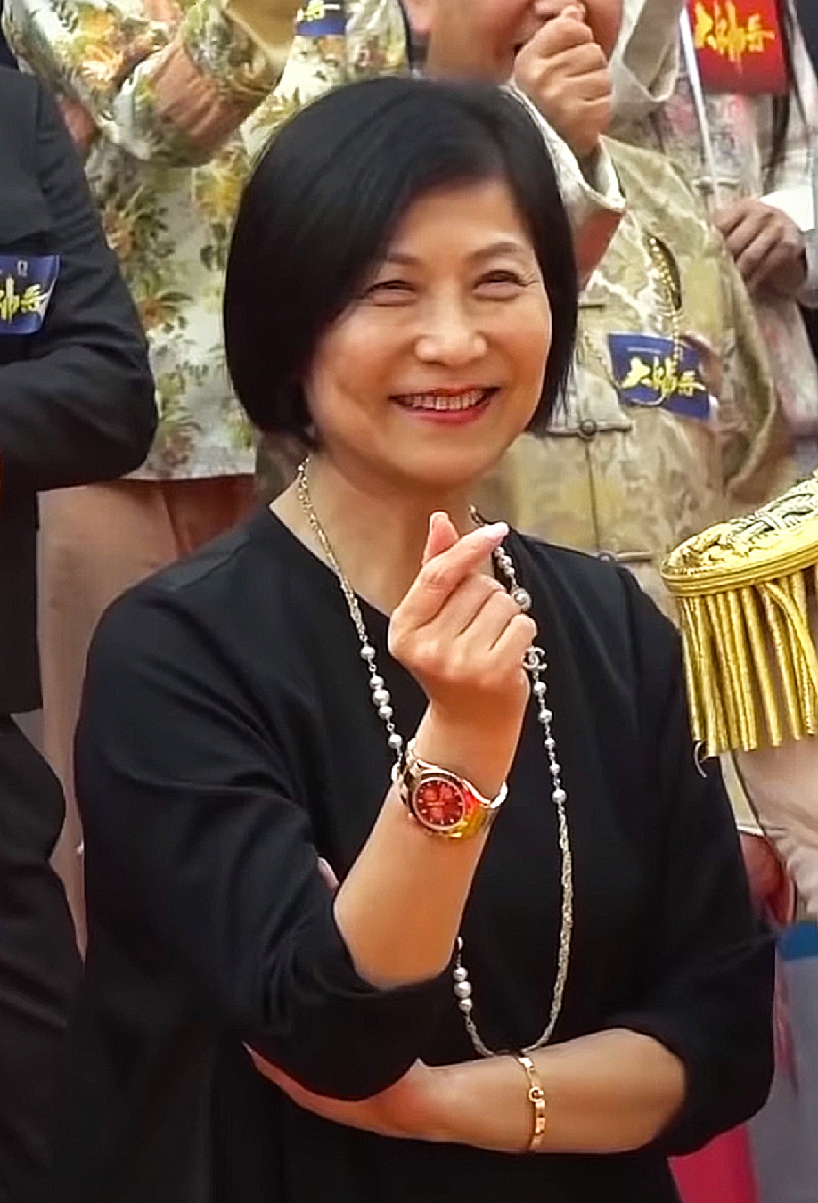 中文（香港）: 《大帥哥》「帥氣登場」活動